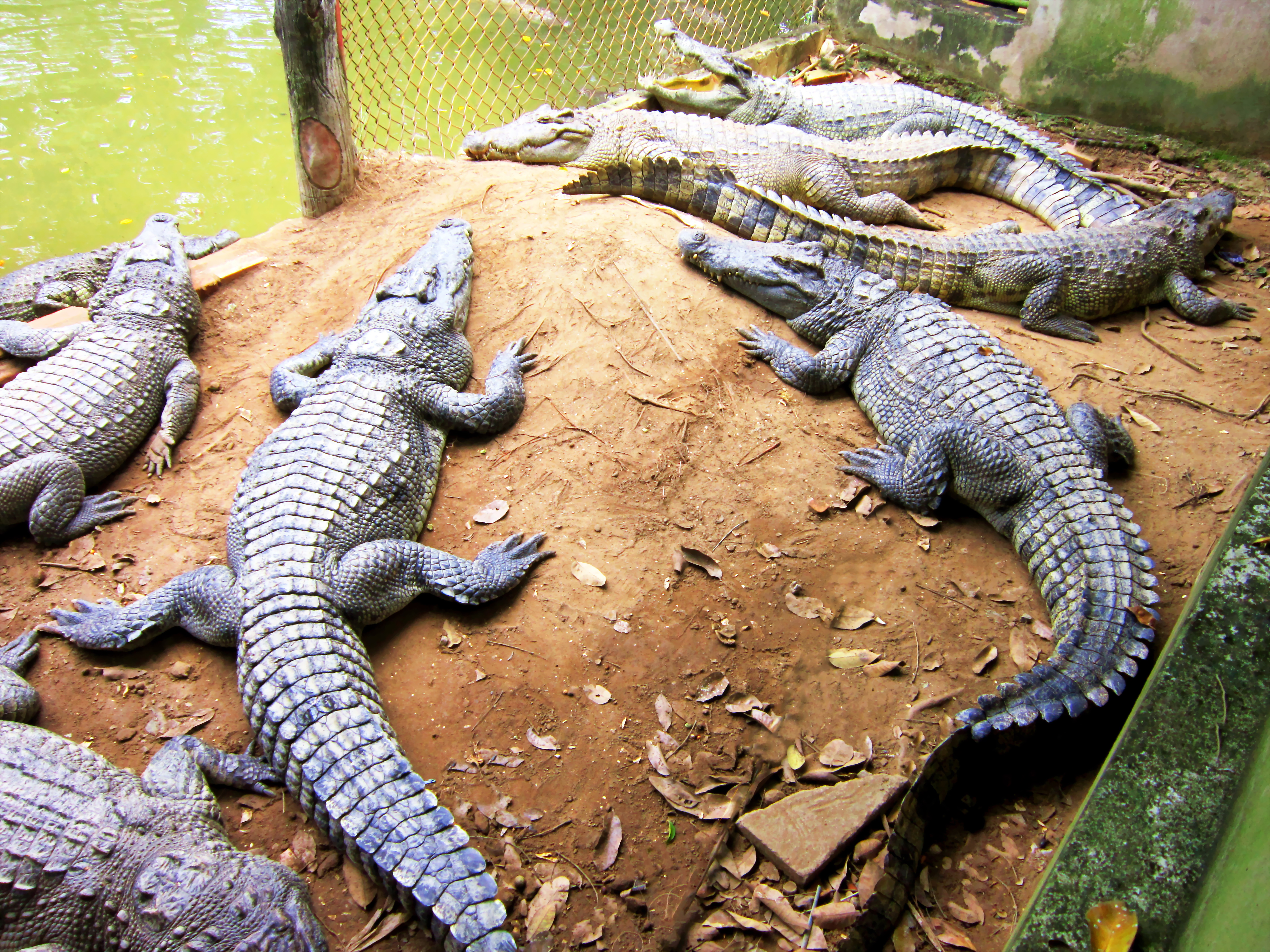 Nuôi cá sấu trong một khu lịch trên cồn Phụng ở Bến Tre, Việt Nam.